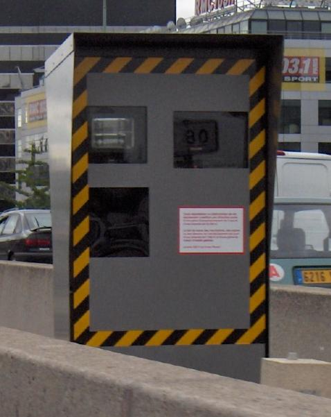 ] ☺ 1 jul 2005 à 11:36 (CEST)